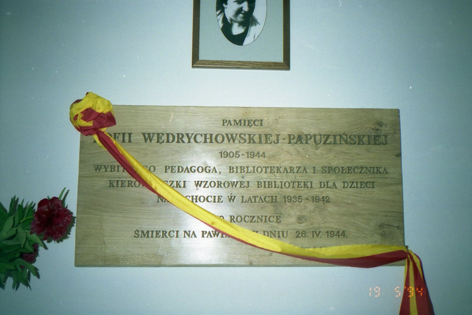 Tablica upamiętniająca Zofię Wędrychowską-Papuzińską odsłonięta w dniu 19.05.1994 w Bibliotece dla Dzieci i Młodzieży Nr 5